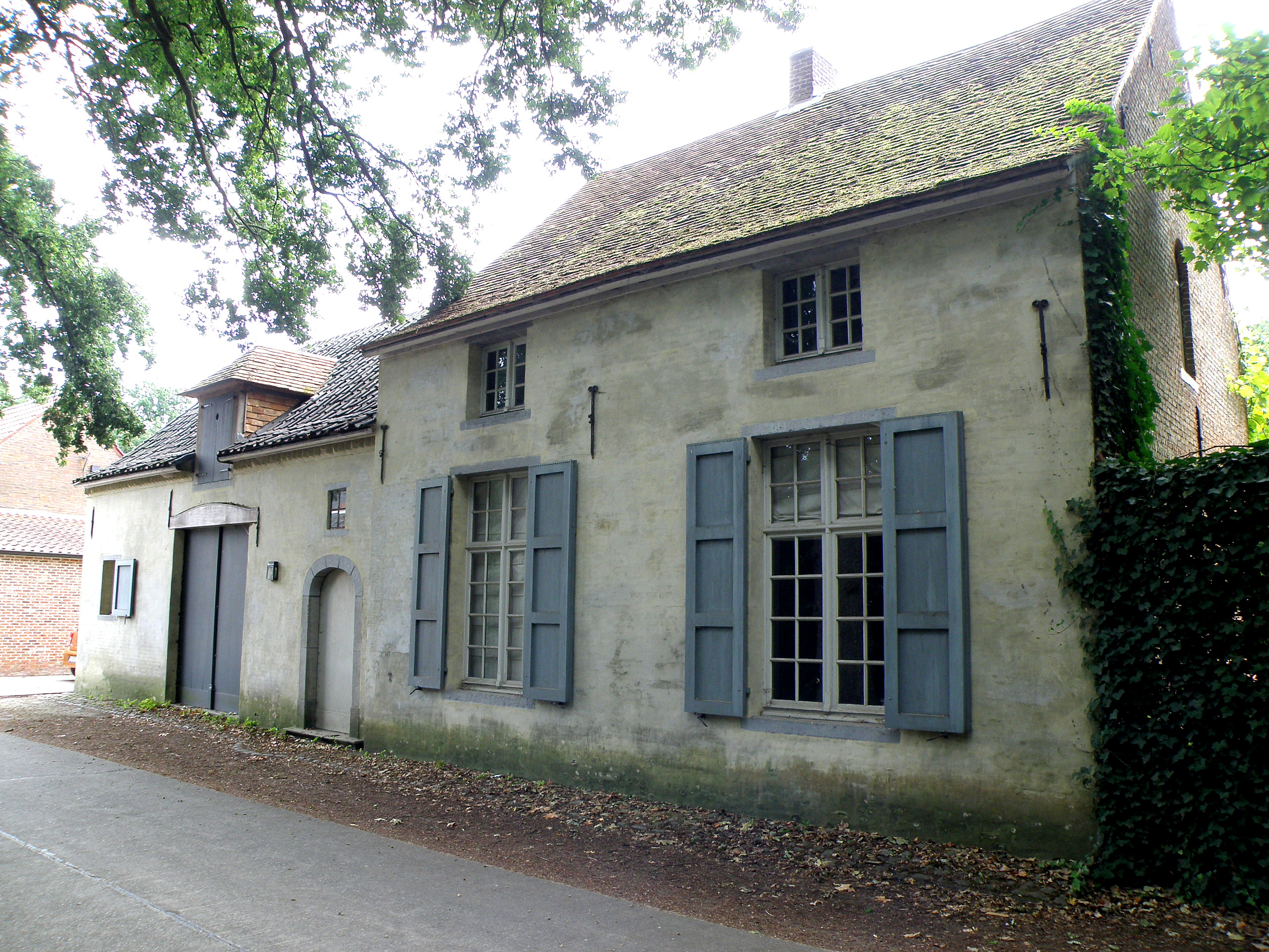 Sint-Katelijne-Waver (prov. Antwerpen, België). Kasteel Rozenhouthof, bijgebouwen aan de Kuikenstraat.